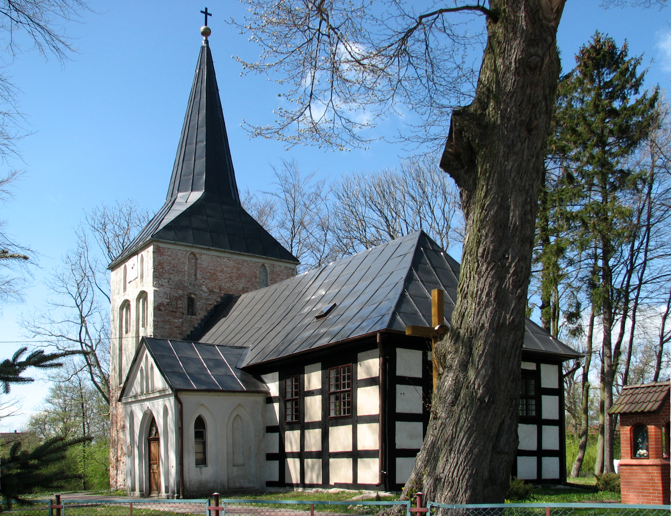 Wytowno - rzymskokatolicki kościół parafialny p.w. Św. Franciszka z Asyżu, 2 poł. XVII, XIX, wraz z otoczeniem.